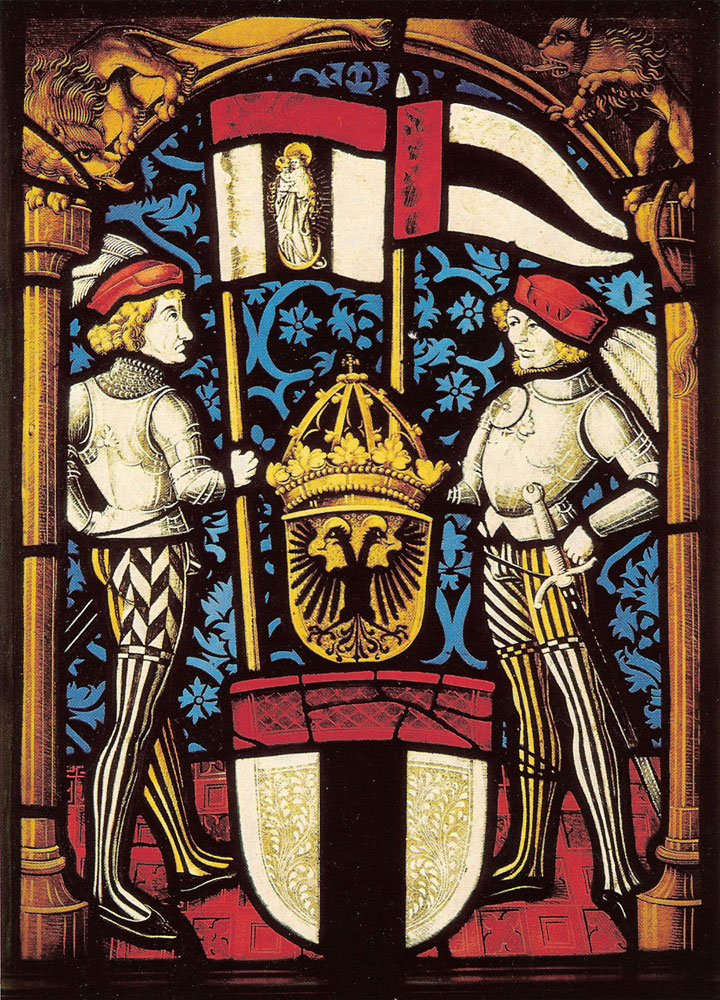 Wappenscheibe der Stadt Baden AG aus dem Jahr 1501 Ursprünglich im Tagsatzungssaal, heute im Zimmer des Stadtrates zu finden Wappen überhöht vom Reichsschild